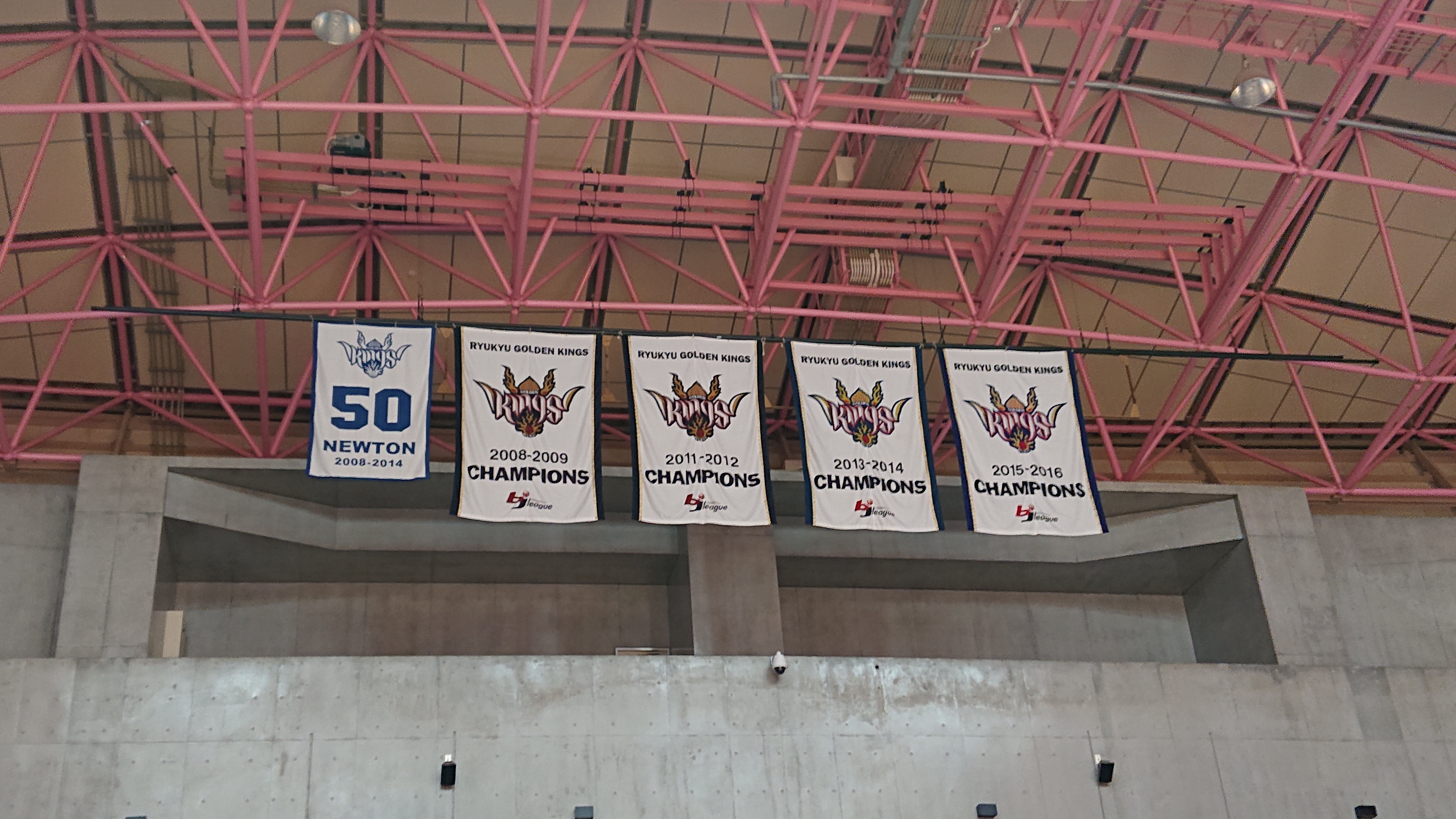 琉球ゴールデンキングス 歴代優勝フラッグ